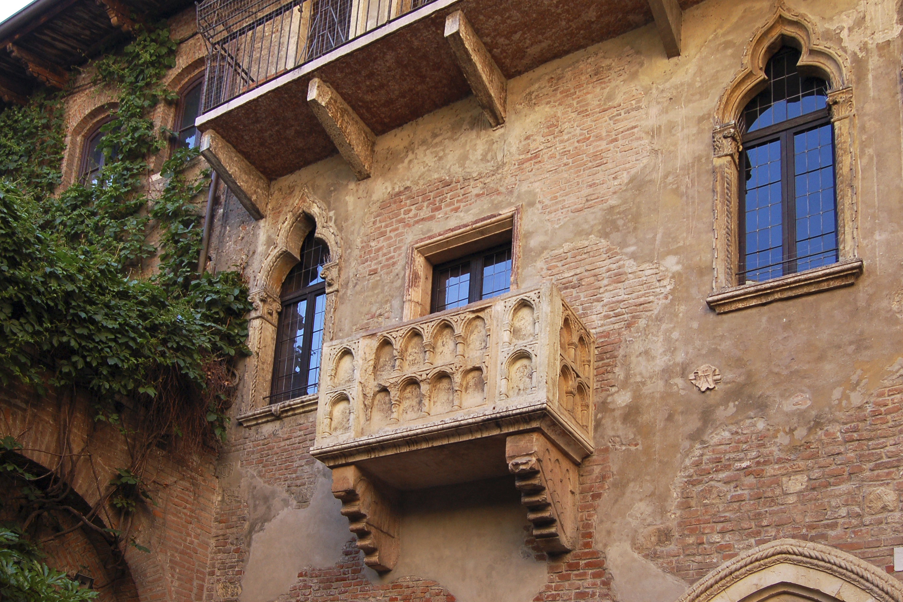 Fotografia della casa di Giulietta a Verona